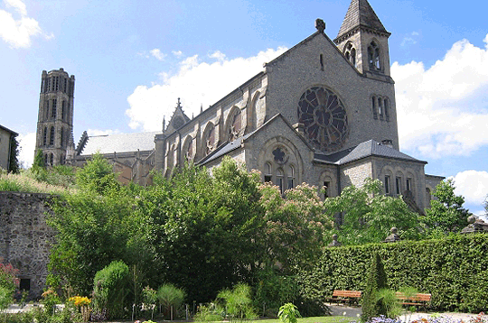 L'Abbaye de la Règle, avec au loin la cathédrale Saint-Etienne et devant, les jardins.